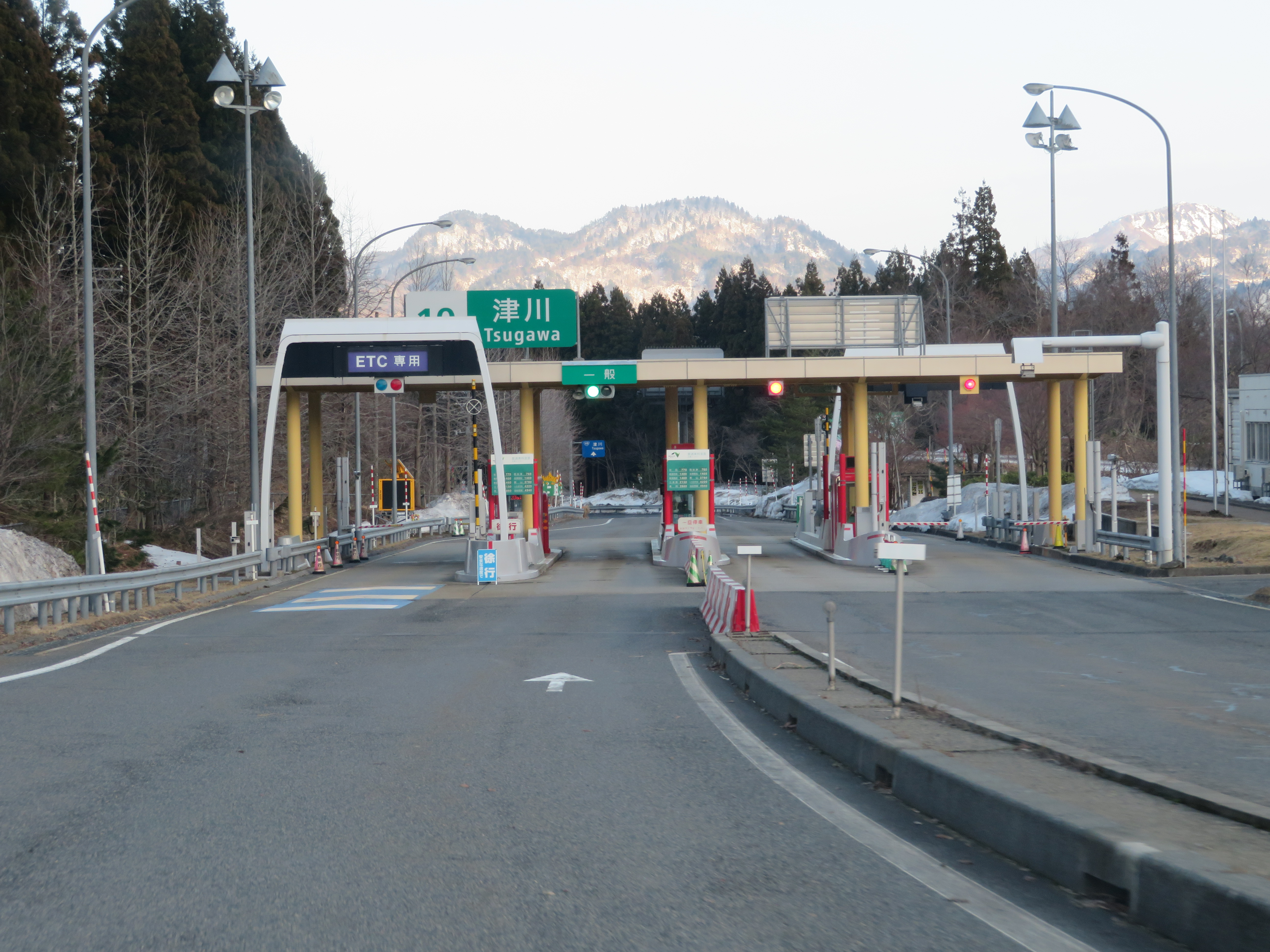 磐越自動車道津川ＩＣ料金所付近